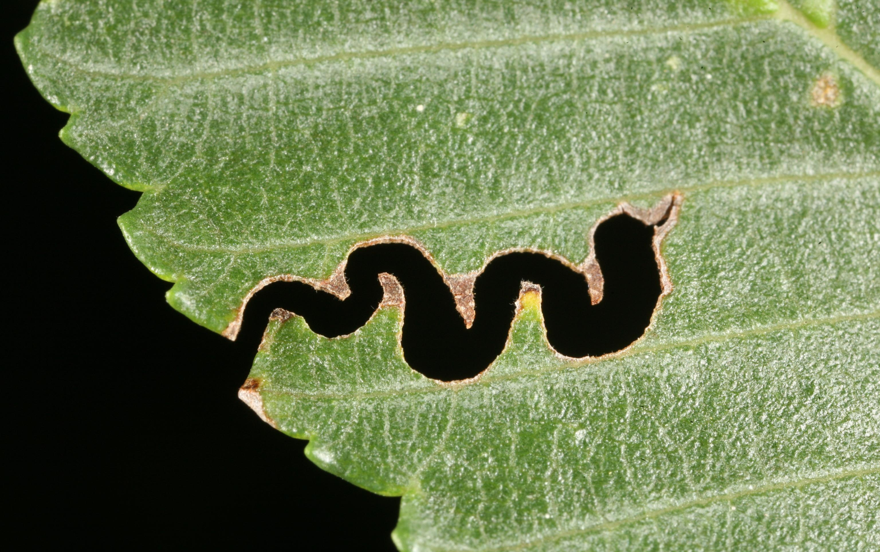 Découpe caractéristique en zigzag faite par une larve d'Aproceros leucopoda sur une feuille d'orme.